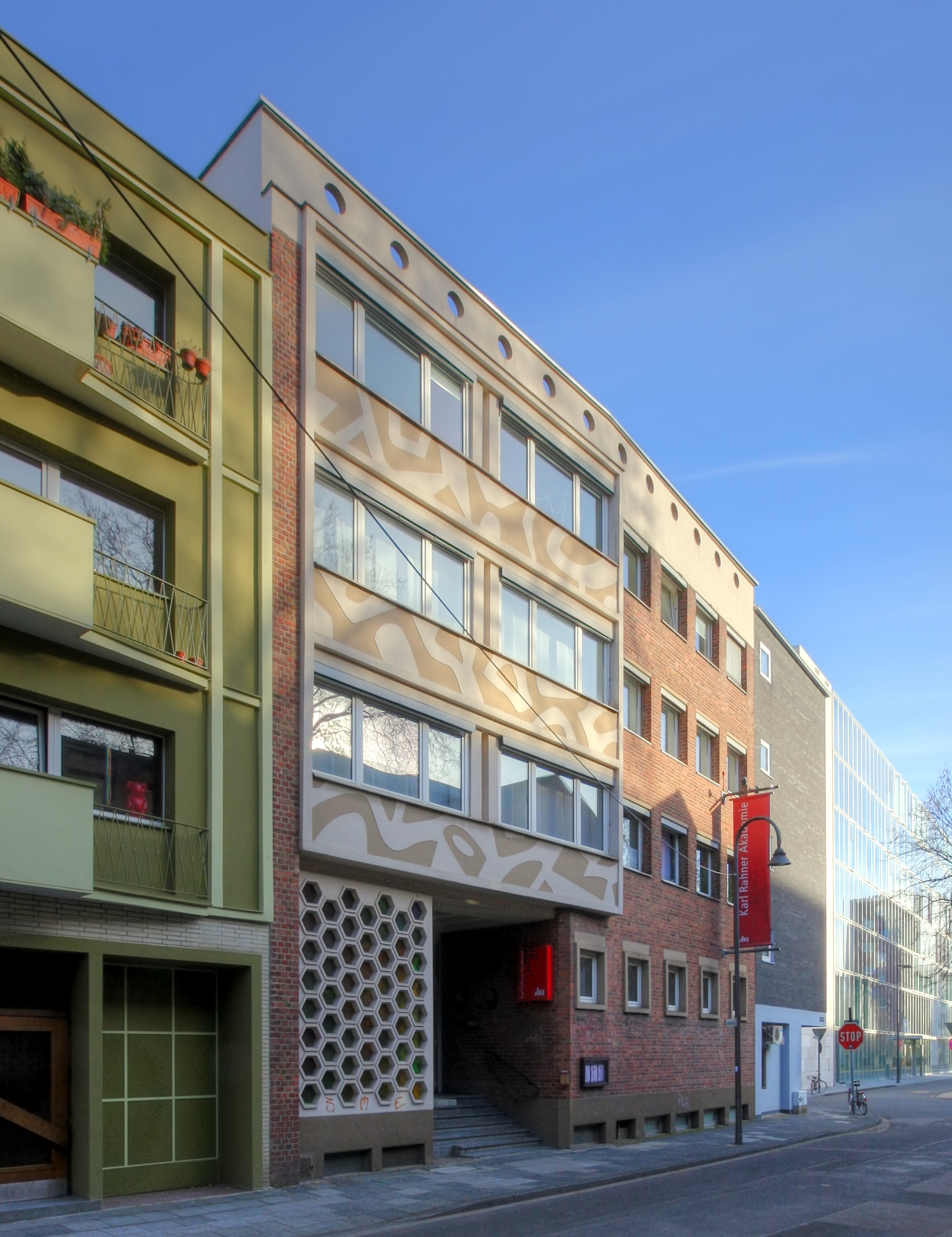 Karl-Rahner-Akadamie, Jabachstr. 4-8, 50676 Köln. Architekt: Karl Band. Baujahr: 1955-57